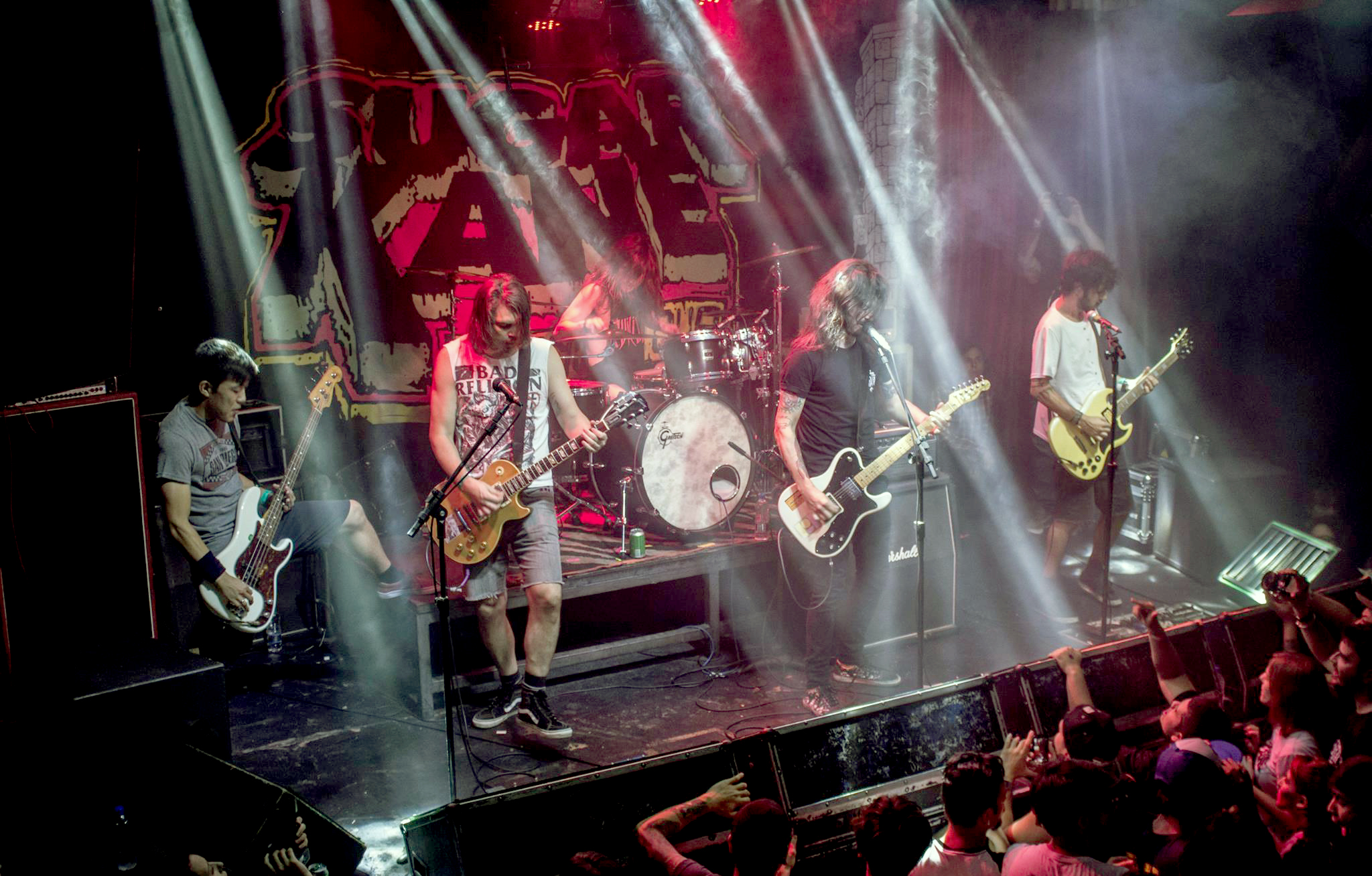 Sugar Kane no último show da turnê de 20 Anos da banda, no Hangar 110, em São Paulo, Brasil.